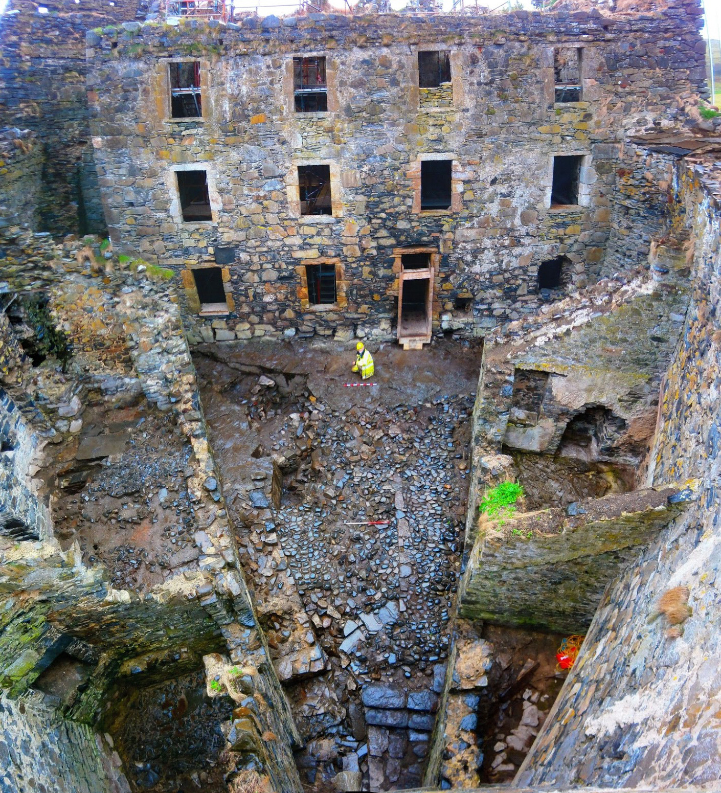 Mingary Castle, Innenhof